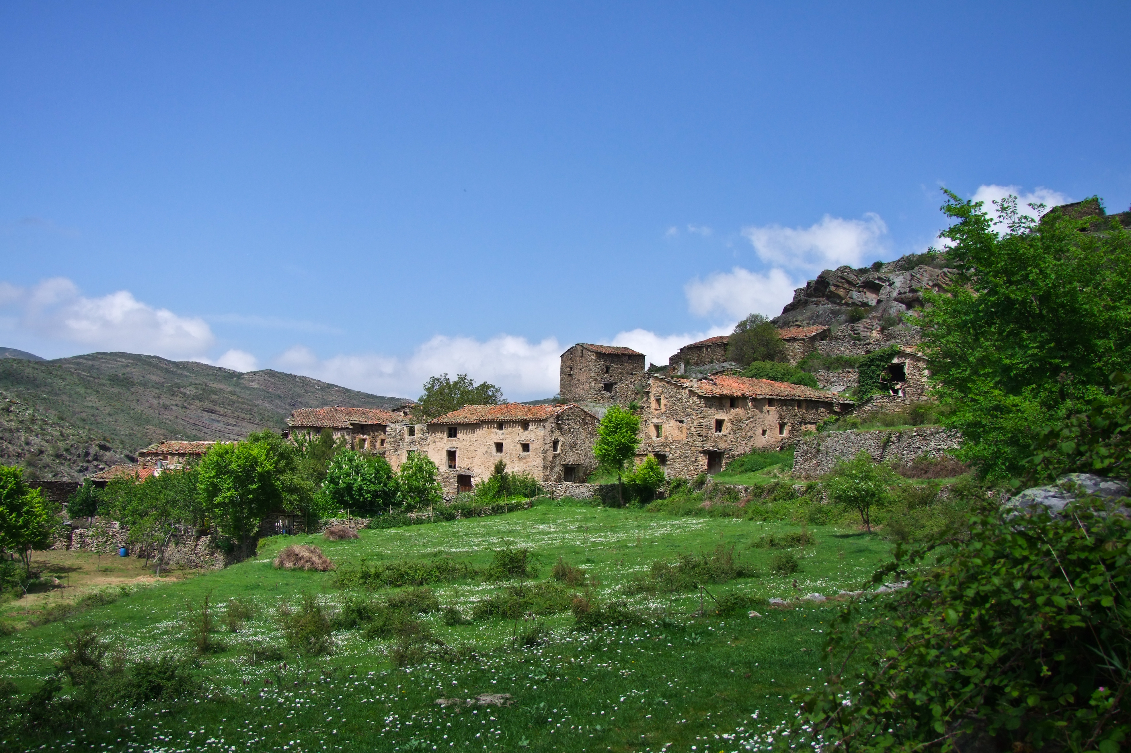 Oliván, La Rioja - España